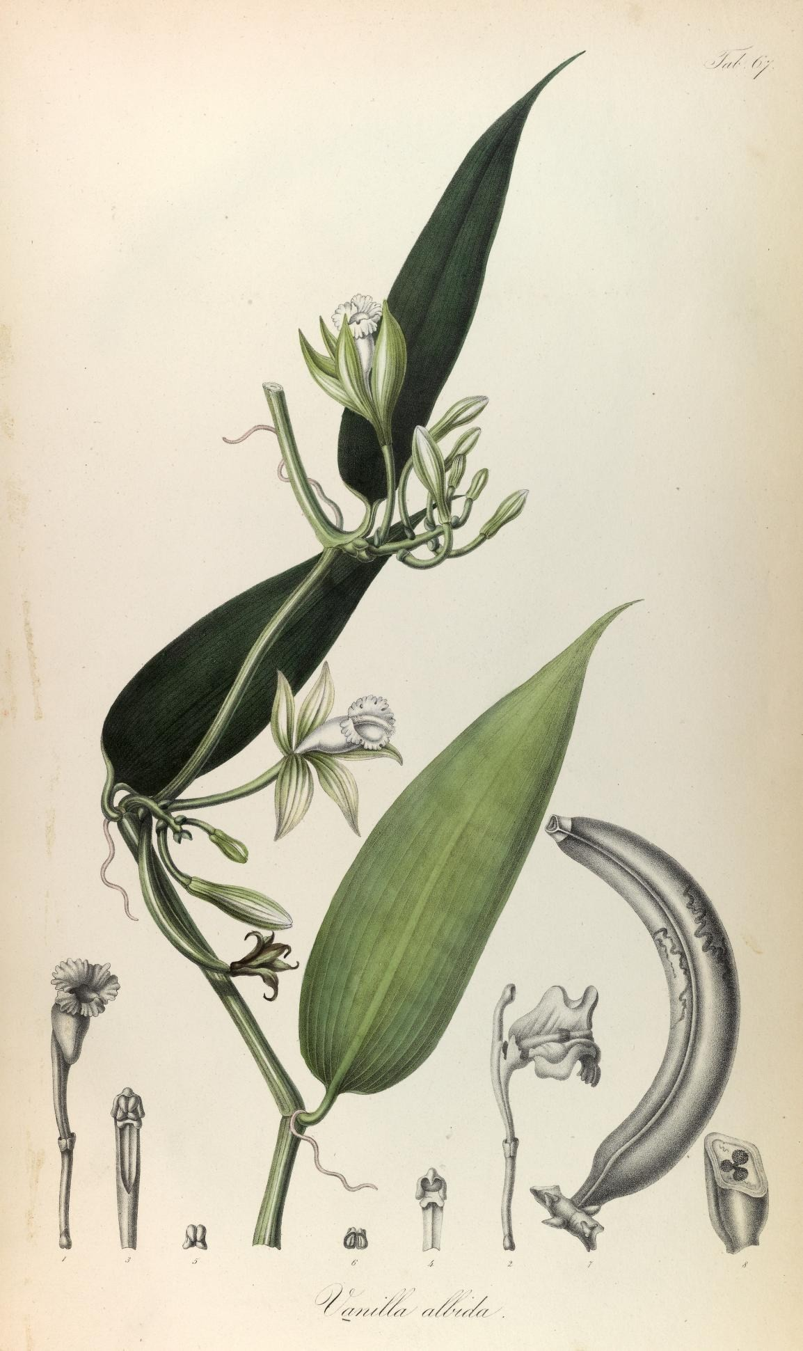 tL V/ s/r/vrfsf.